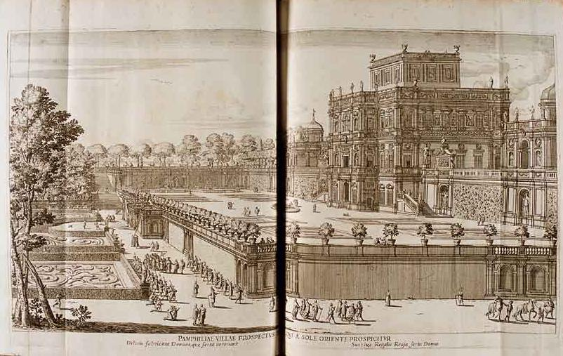 VILLA Pamphilia eiusque palatium, cum suis prospectibus, statuae, fontes, vivaria, theatra, areolae, plantarum, viarumque ordines, cum eiusdem villae absoluta delineatione. Romae [Roma]: Formis Io. Iacobi de Rubeis, apud Templum S. Mariae de Pace, [1660?].